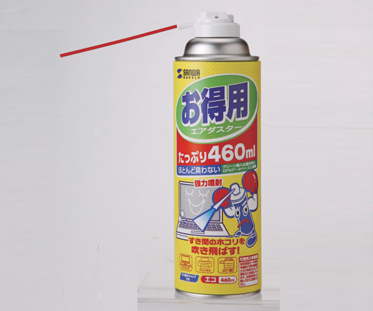 サンワサプライ エアダスター460ml